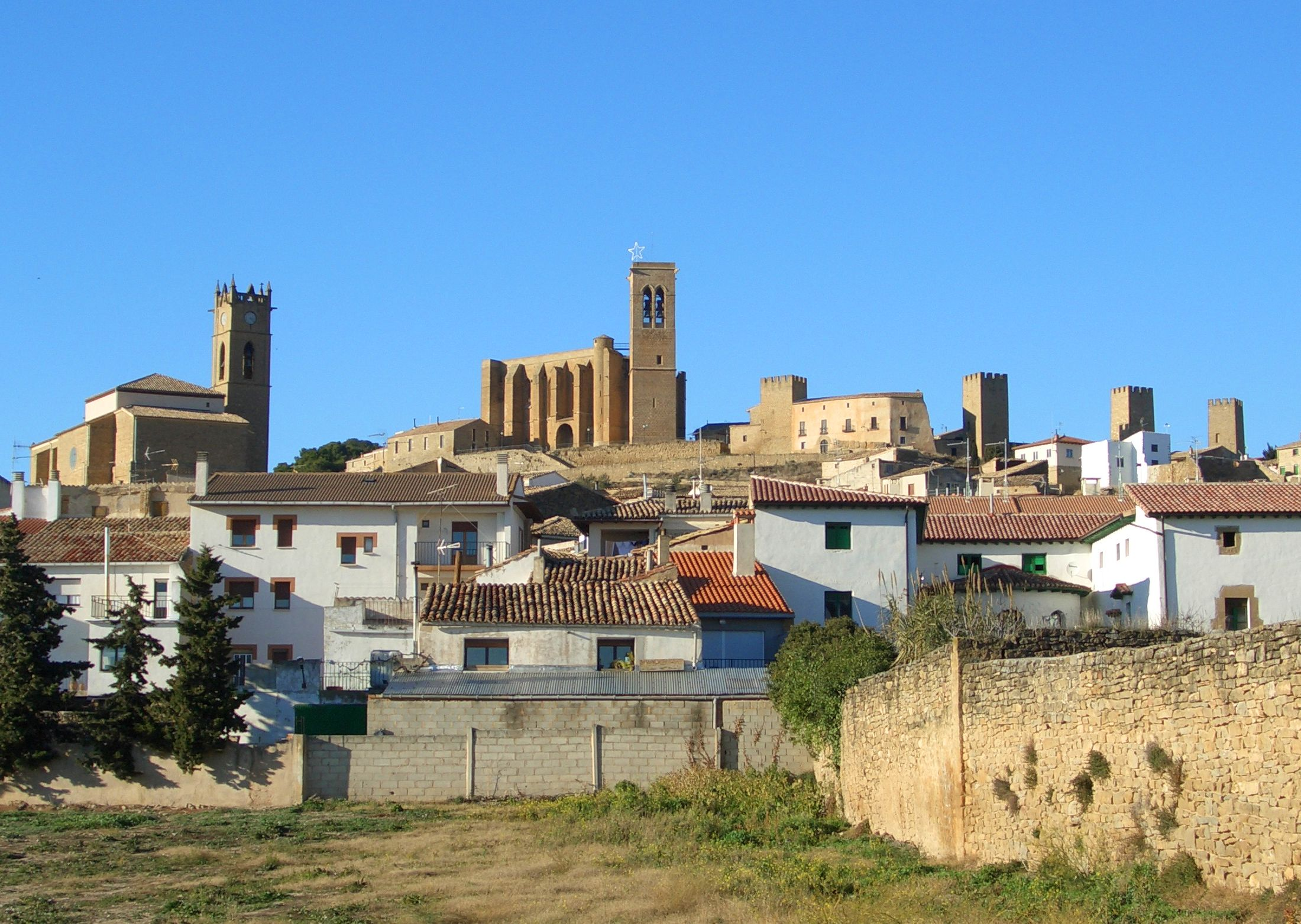 Artajona